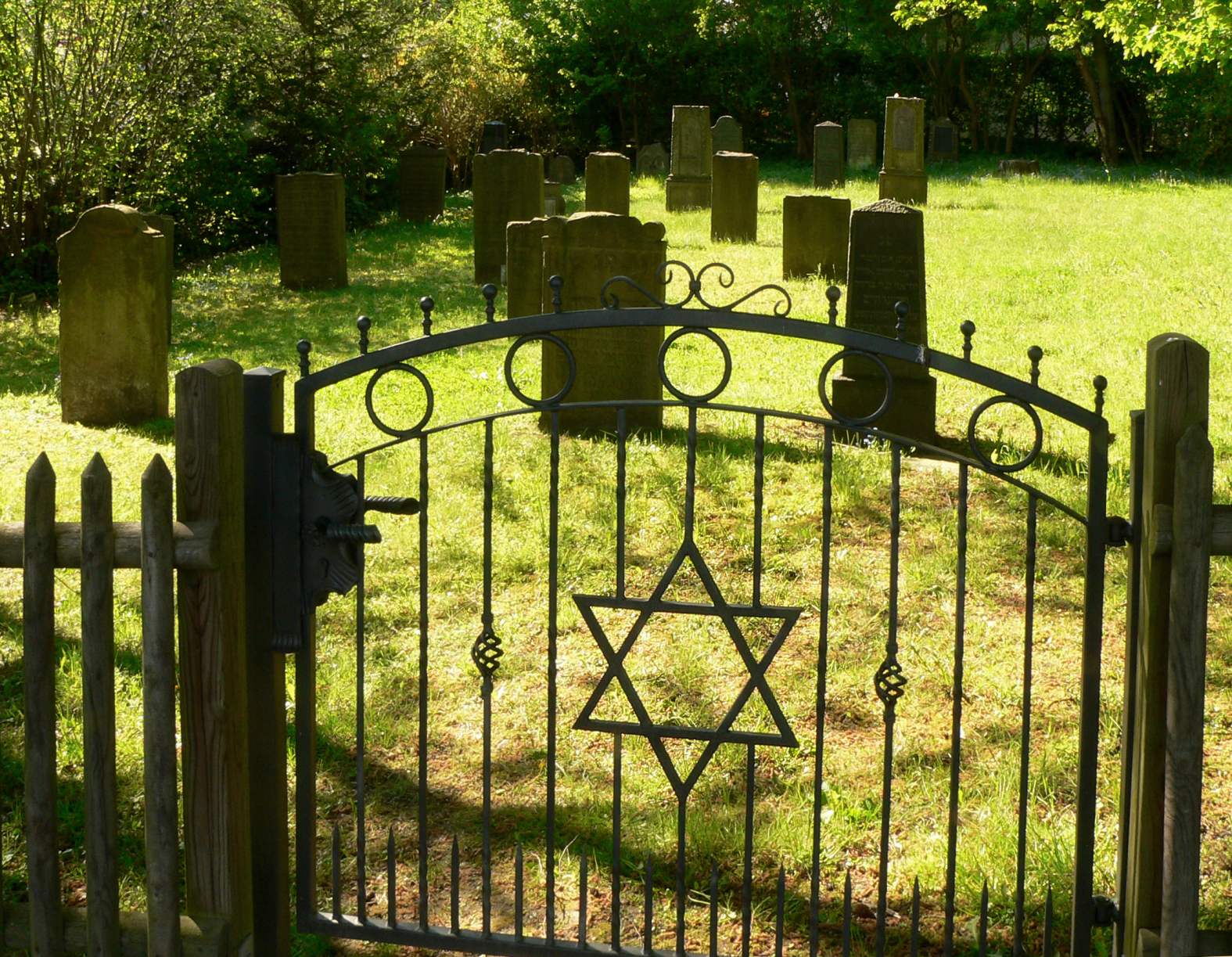 Jüdischer Friedhof Bad Münder, Eingangstor